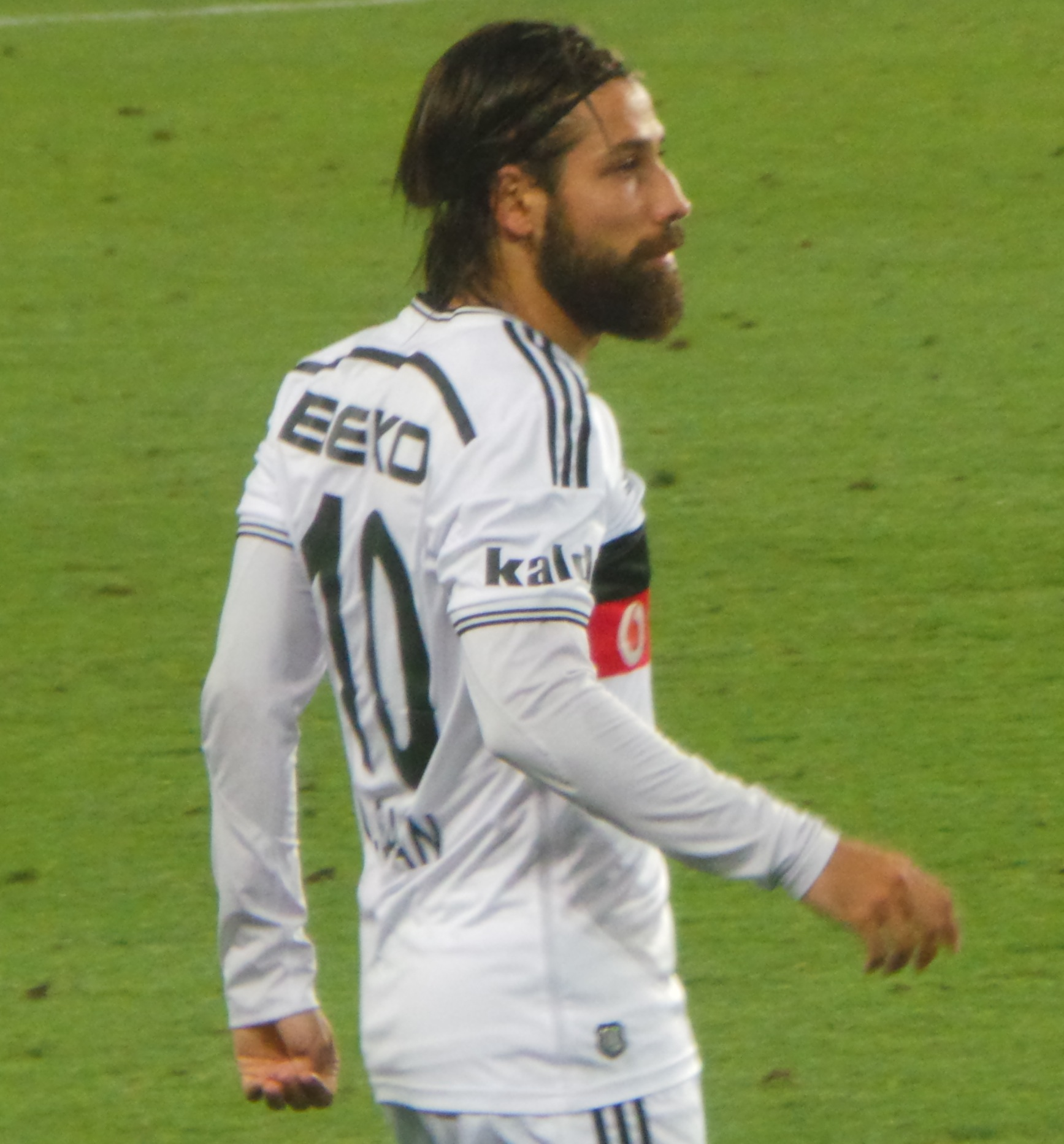 Olcay Şahan'14 SOMA